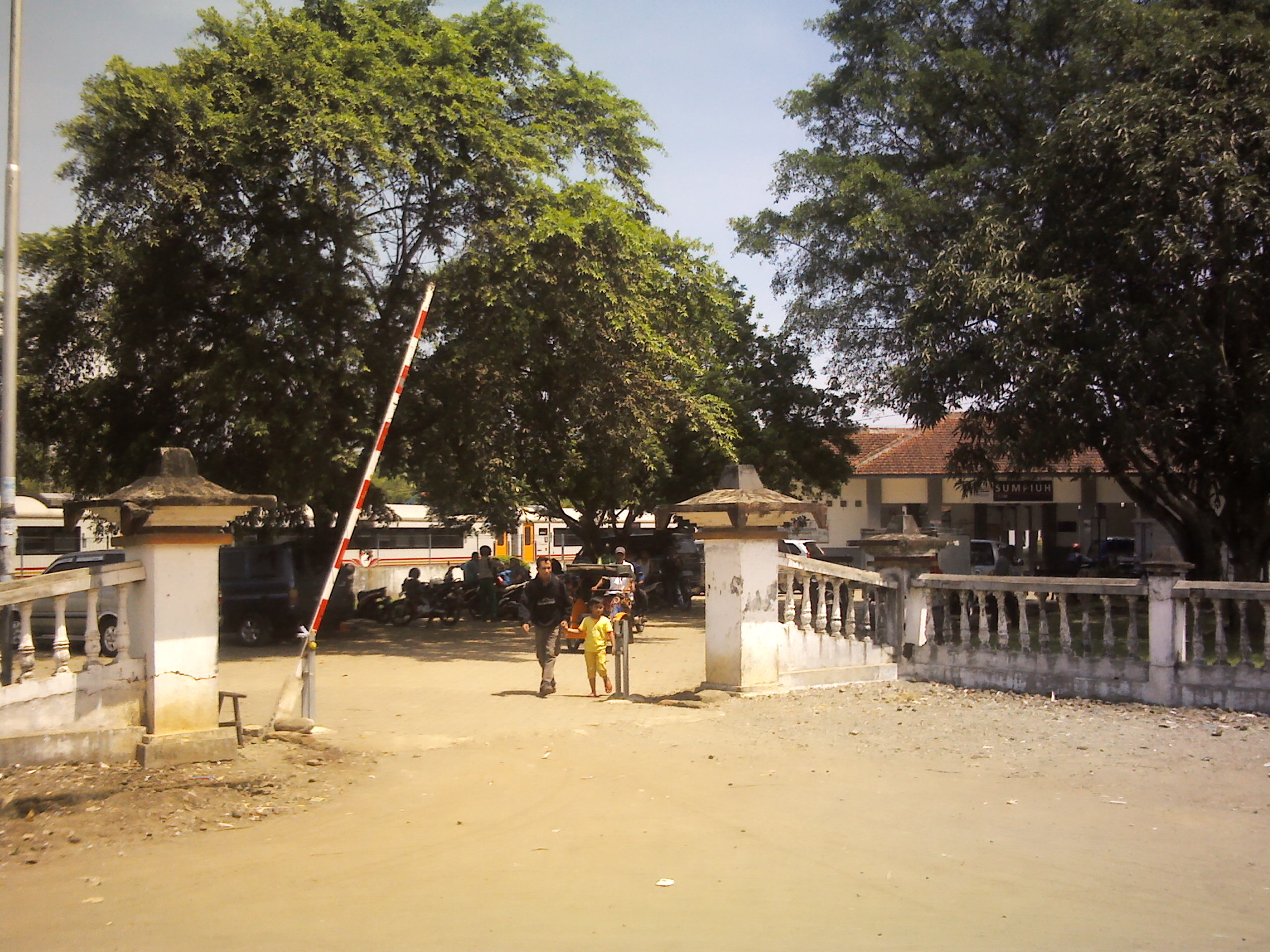 Banyumas